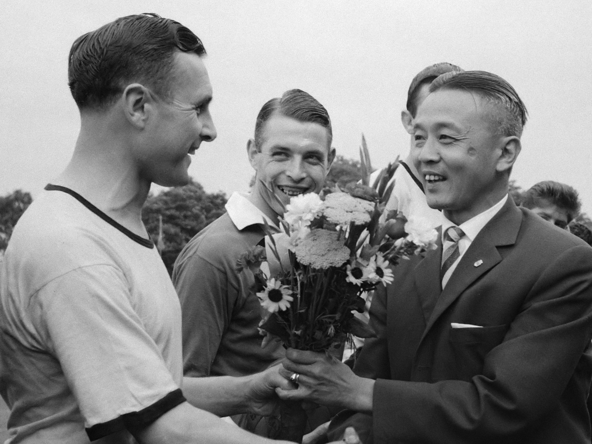 VVV tegen FC Grenchen (Zwitserland) 1-0. Intertoto. Gijs Nass neemt afscheid 23 juli 1961